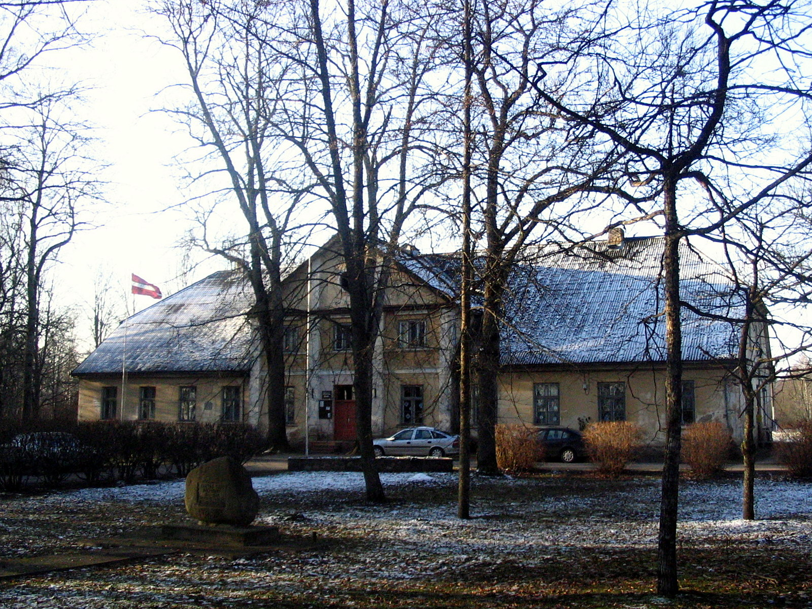 Snēpeles pagasta valde